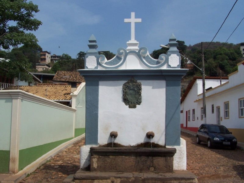 Chafariz do Kakende em Sabará - MG, Brasil.